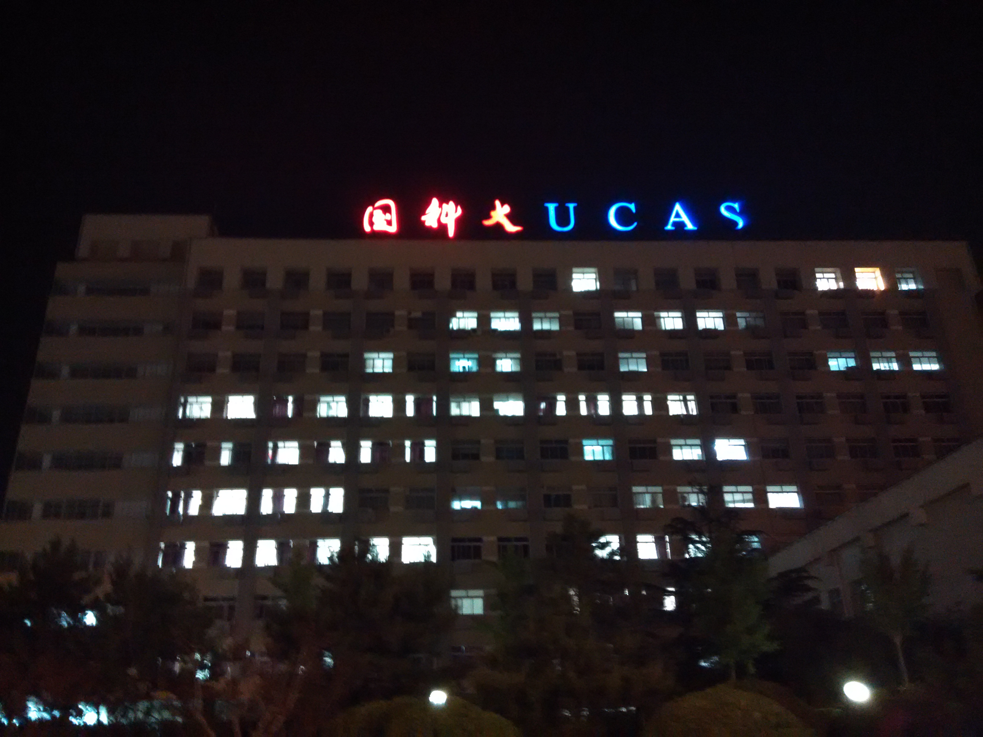 中国科学院大学玉泉路校区教学楼夜景